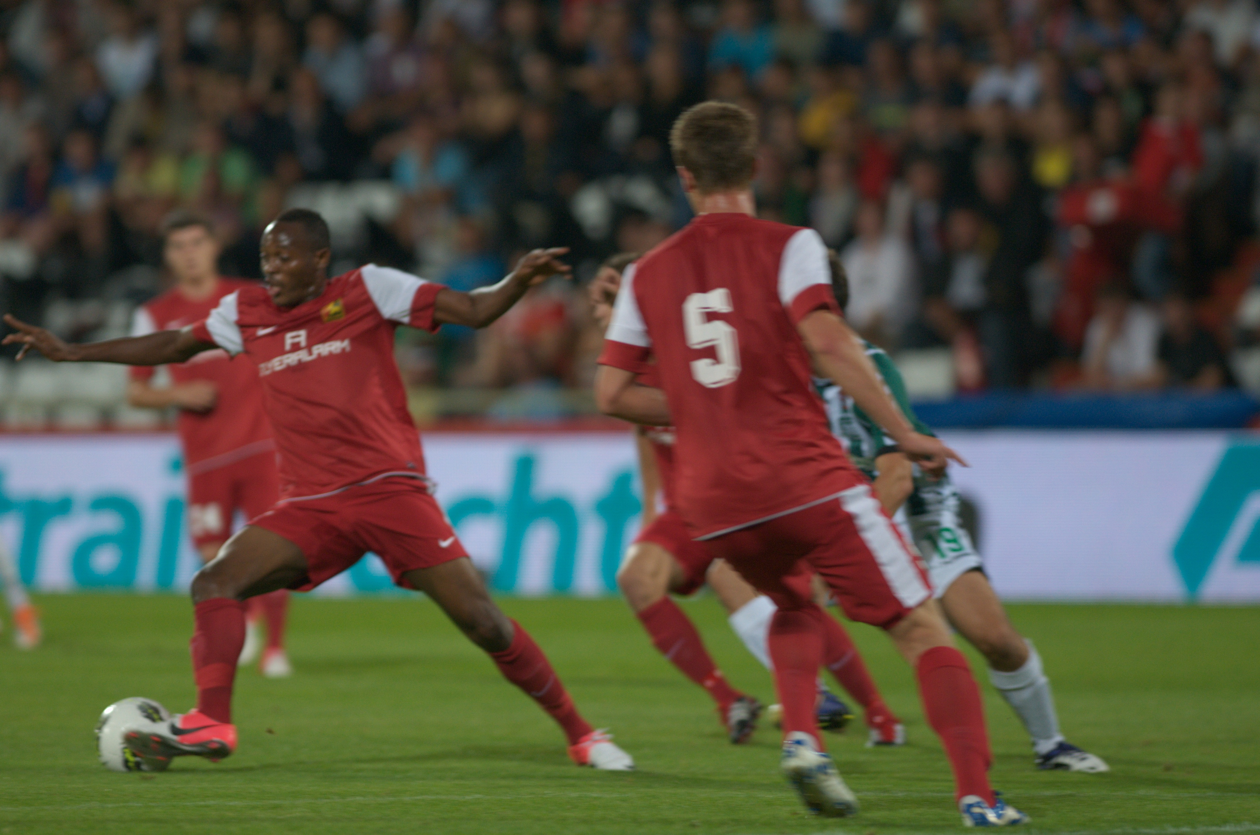 Patrick Mevoungou (links) beim Europa-League-Qualifikationsspiel gegen Zalgiris